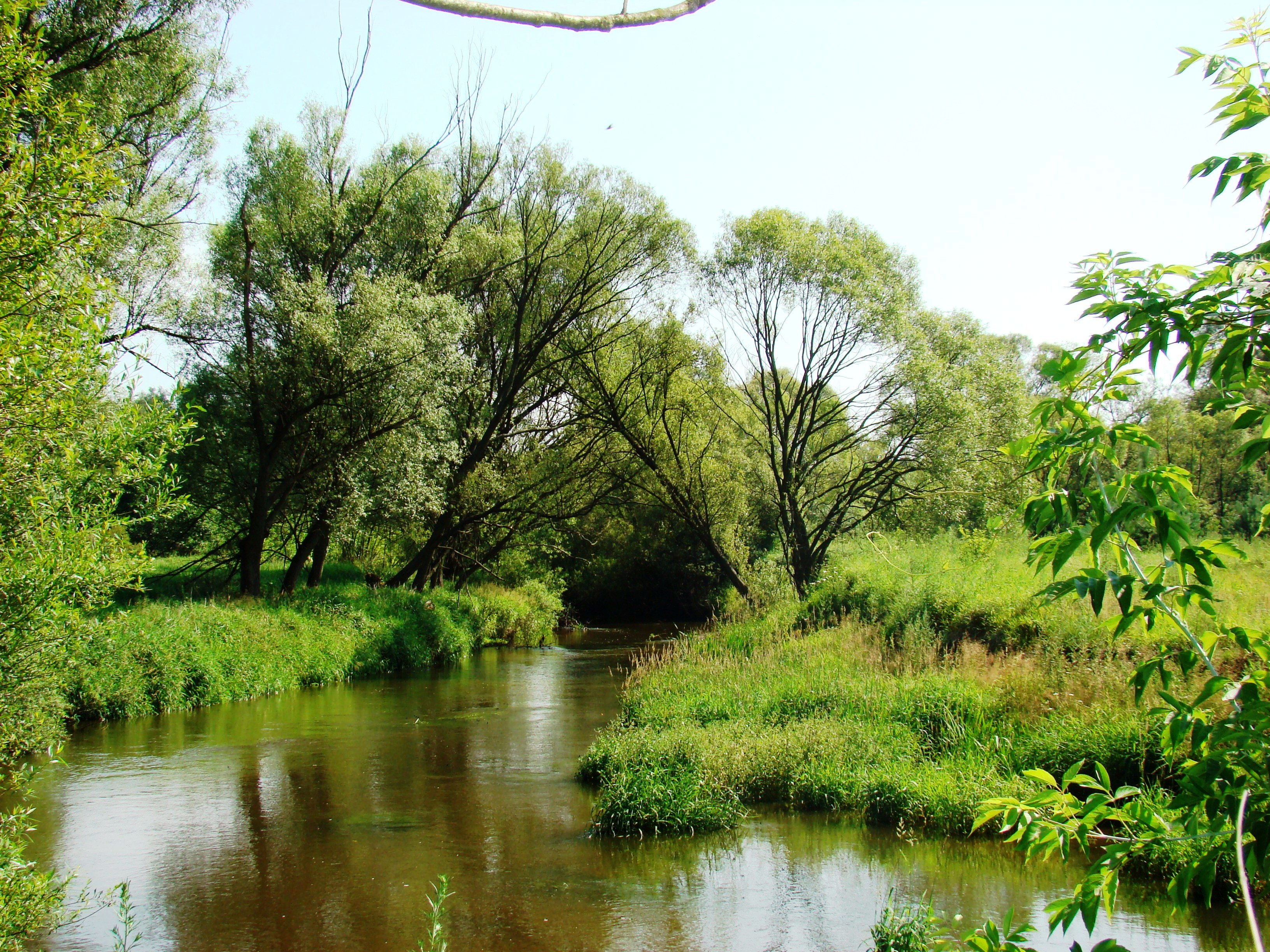 Przełomy Warty w Słowiku